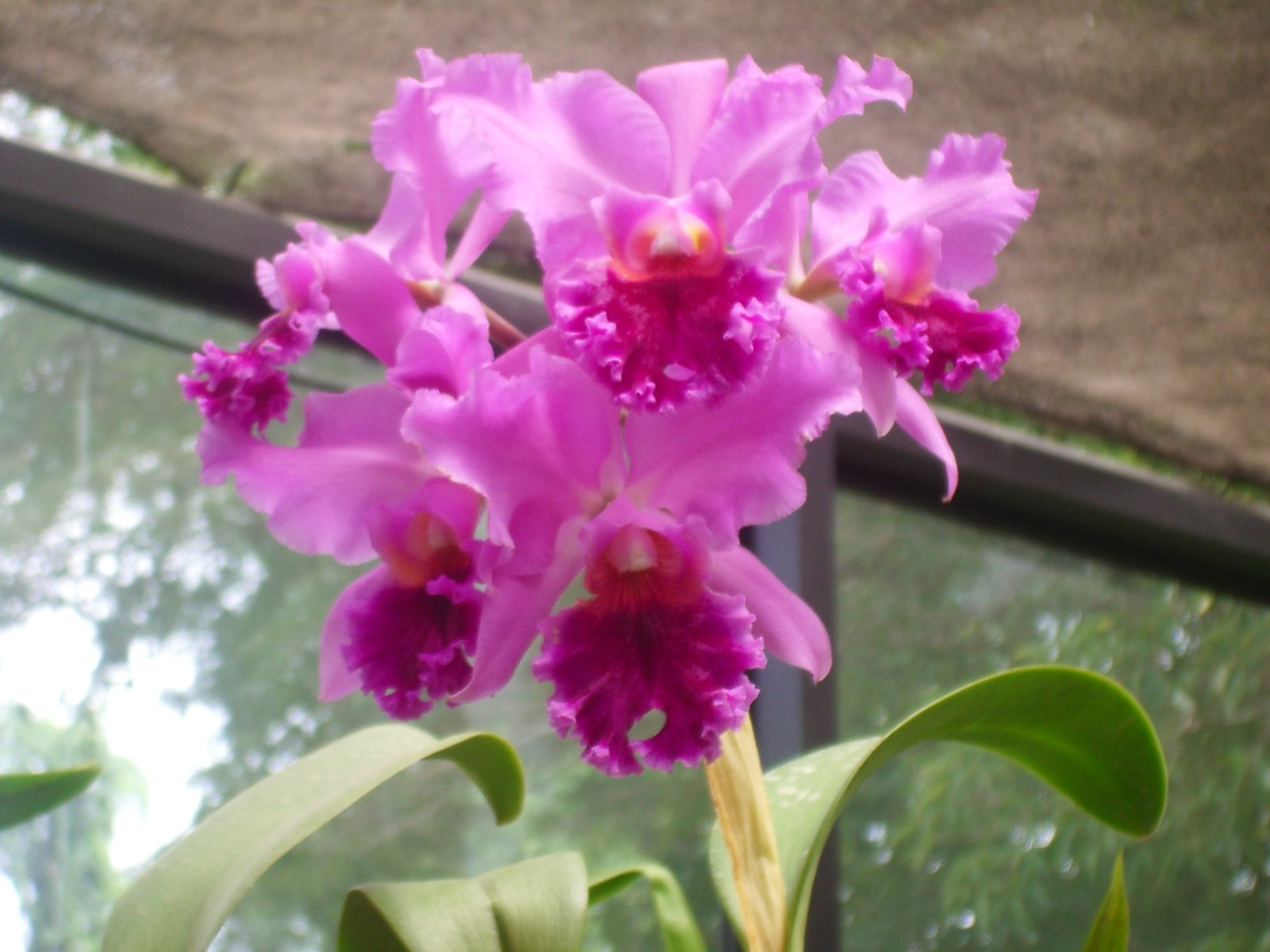 Orquidea de l'important col·lecció del jardi botanic de Peradeniya, prop de Kandy, província Central, Sri Lanka; foto feta per J. Ollé el juliol del 2006